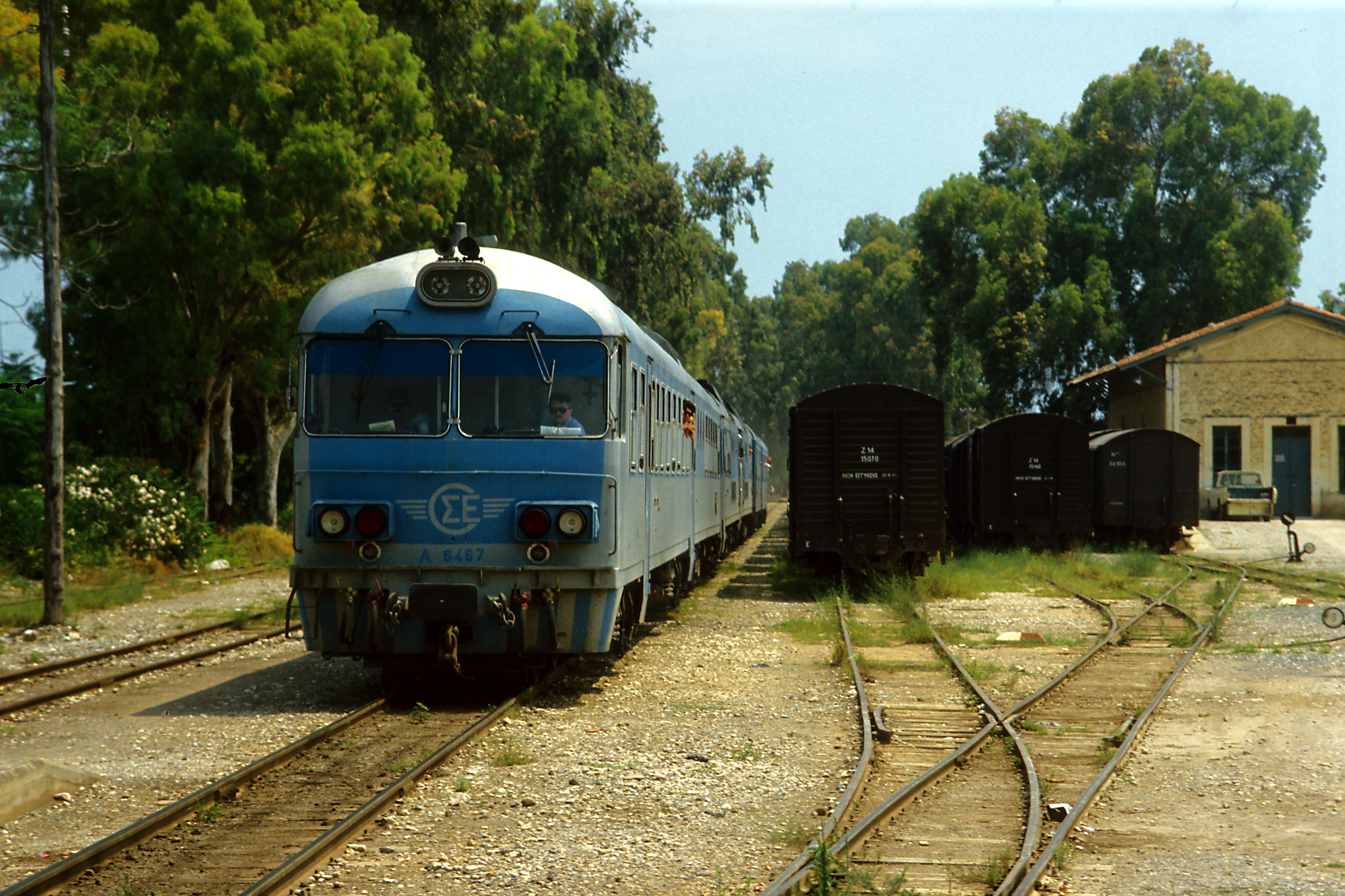 Personenzug Kalamata–Pireás bei der Einfahrt in Árgos. Auf den Gleisen rechts stehen praktisch neue gedeckte Güterwagen. Genutzt werden sie kaum.